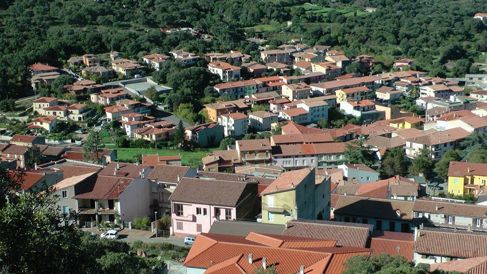 Il rione Lu Pinu di Calangianus, visto da La Crucitta di Monti Alcu.